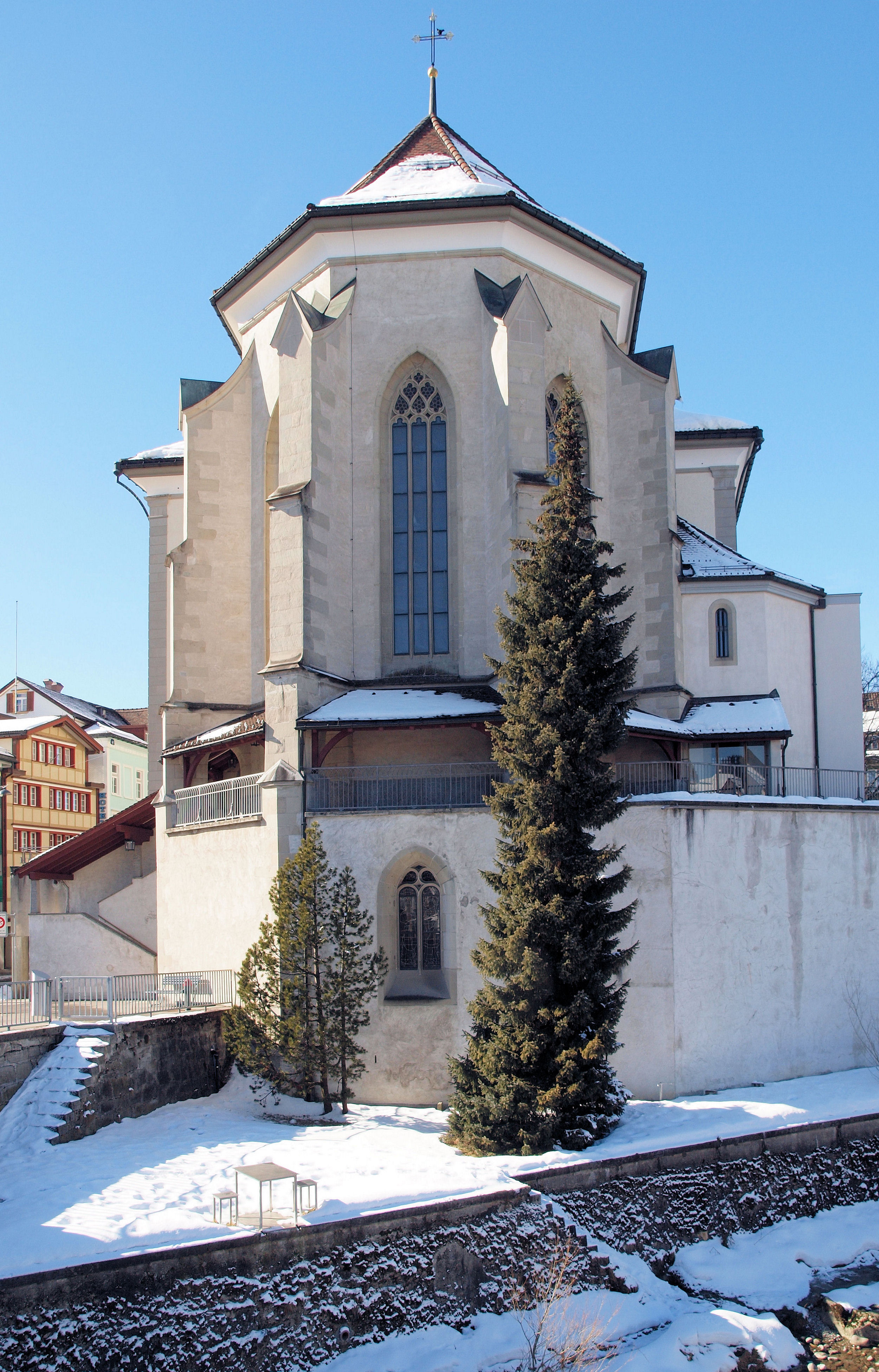 Ostansicht des Chores mit darunterliegender Krypta der Pfarrkirche von Appenzell.